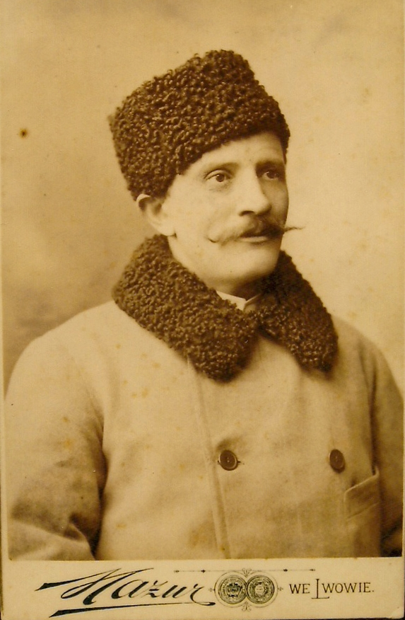 Edward Webersfeld, polski aktor